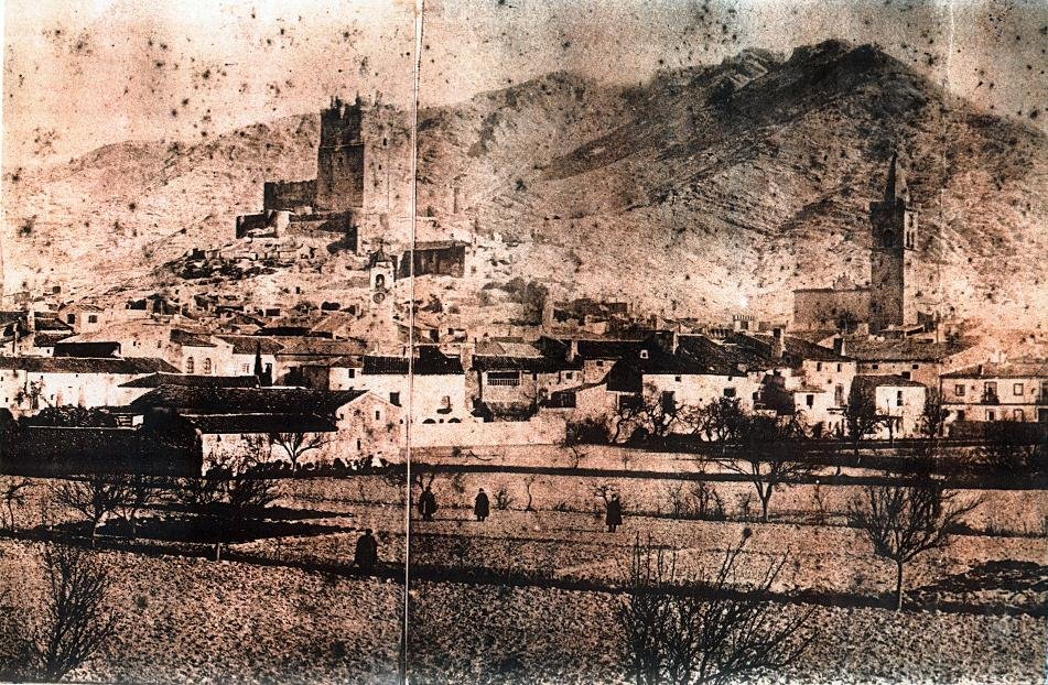 Panorámica de Villena (Alicante) sobre 1850